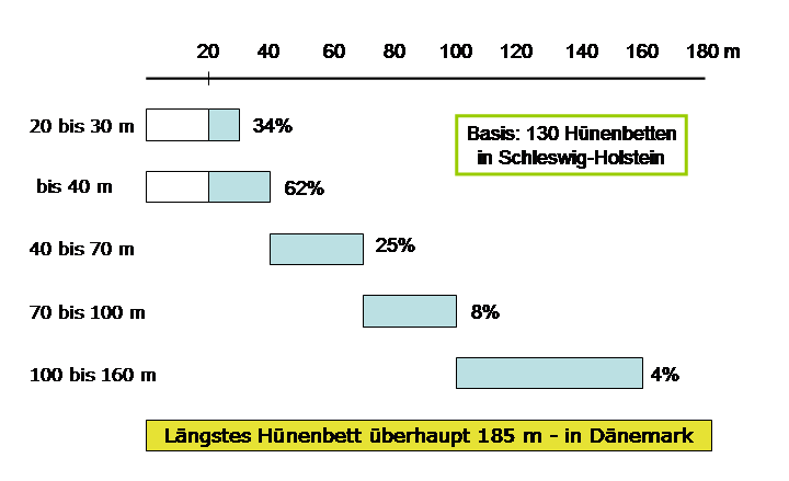 Hünenbetten